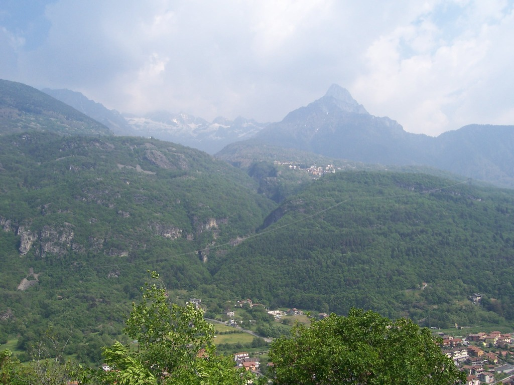 Re Tredenus, Capo di Ponte, Italia